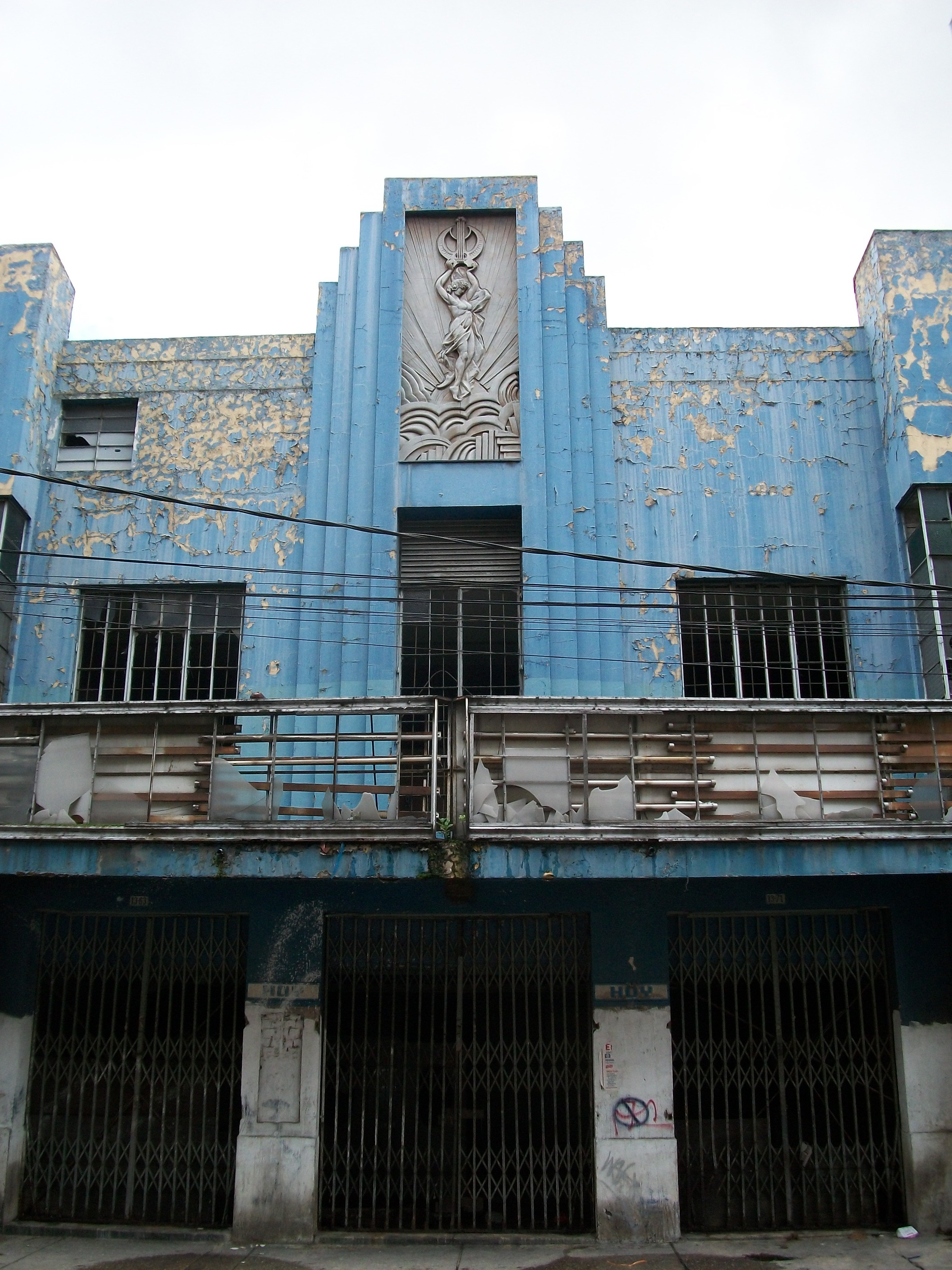 Cuerpo central de la fachada del teatro San Jorge en Bogotá (1935), en la carrera 15 con calle 13.